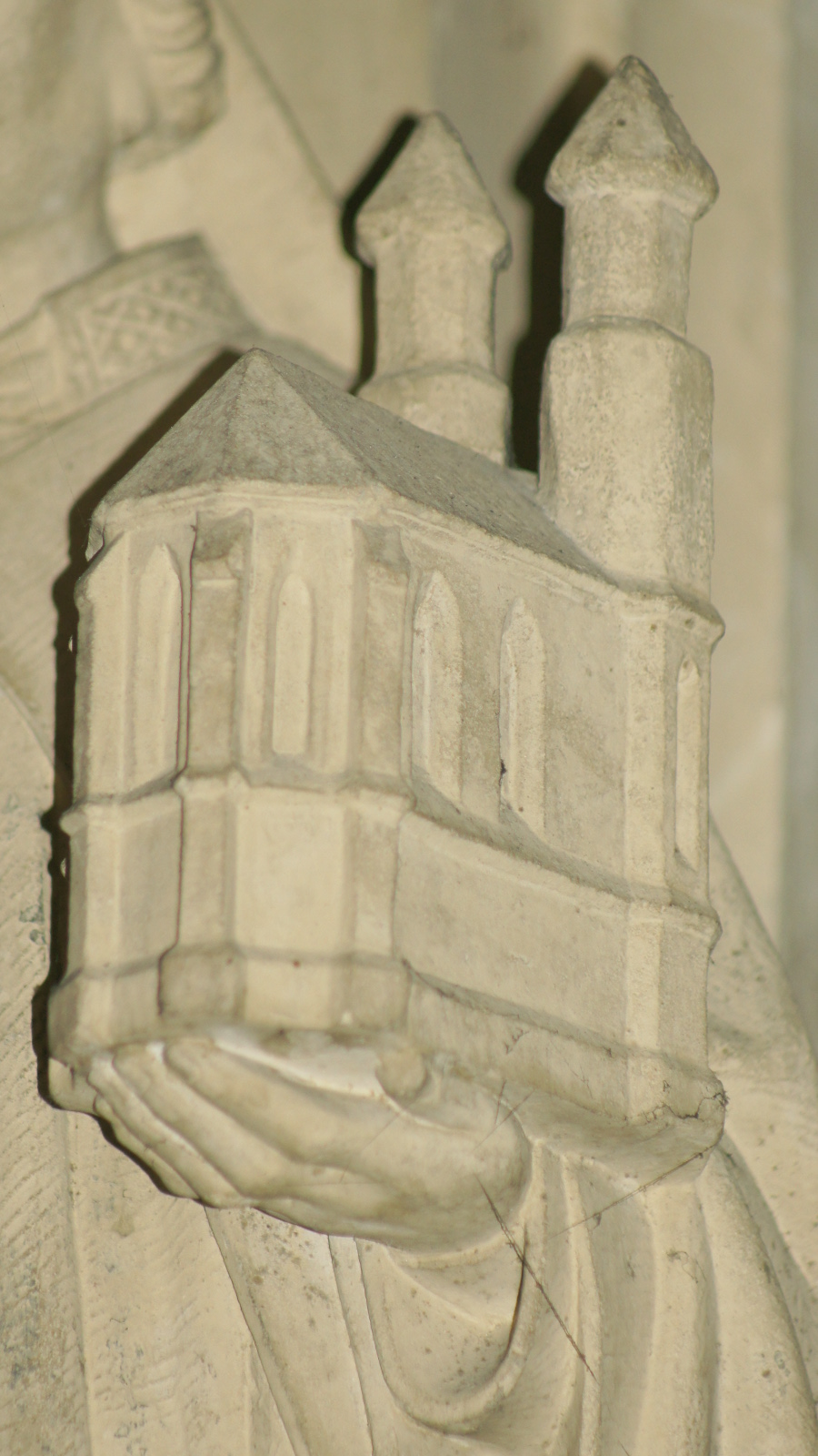 Coesfelder Lambertikirche: Detail aus den Sandsteinfiguren im Gesprenge der Sedilien im Chor. Der Heilige Lambertus hält die Lambertikirche; wie sie vor dem Einsturz der Zwillingstürme im 17. Jahrhundert ausgesehen hat.